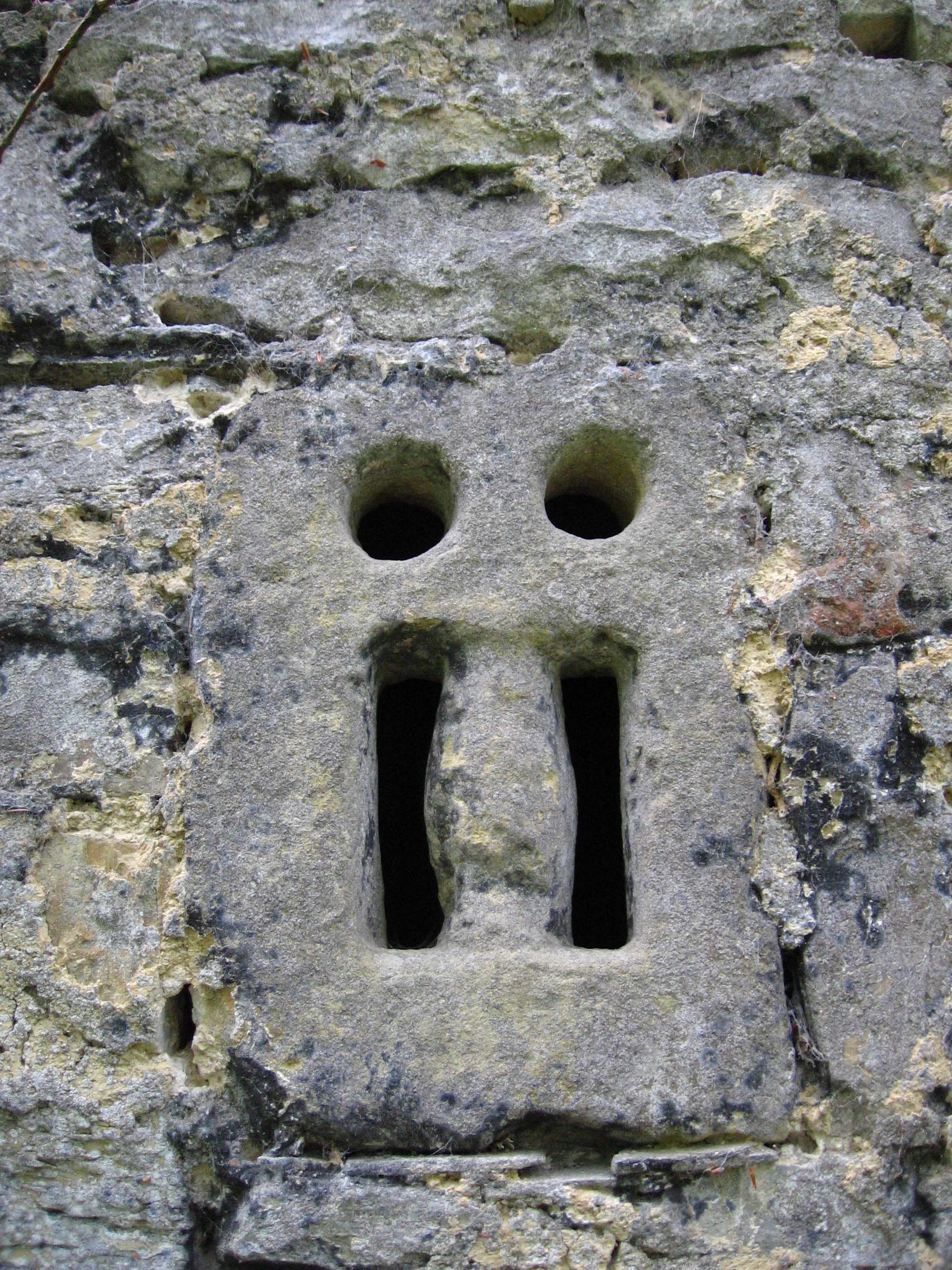 San Pedro baseliza